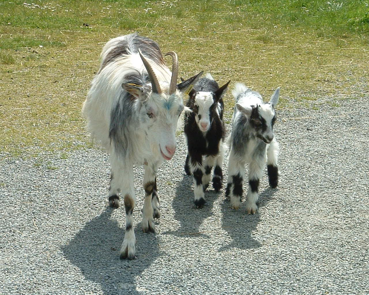 Chèvre des fossés et ses chevreaux